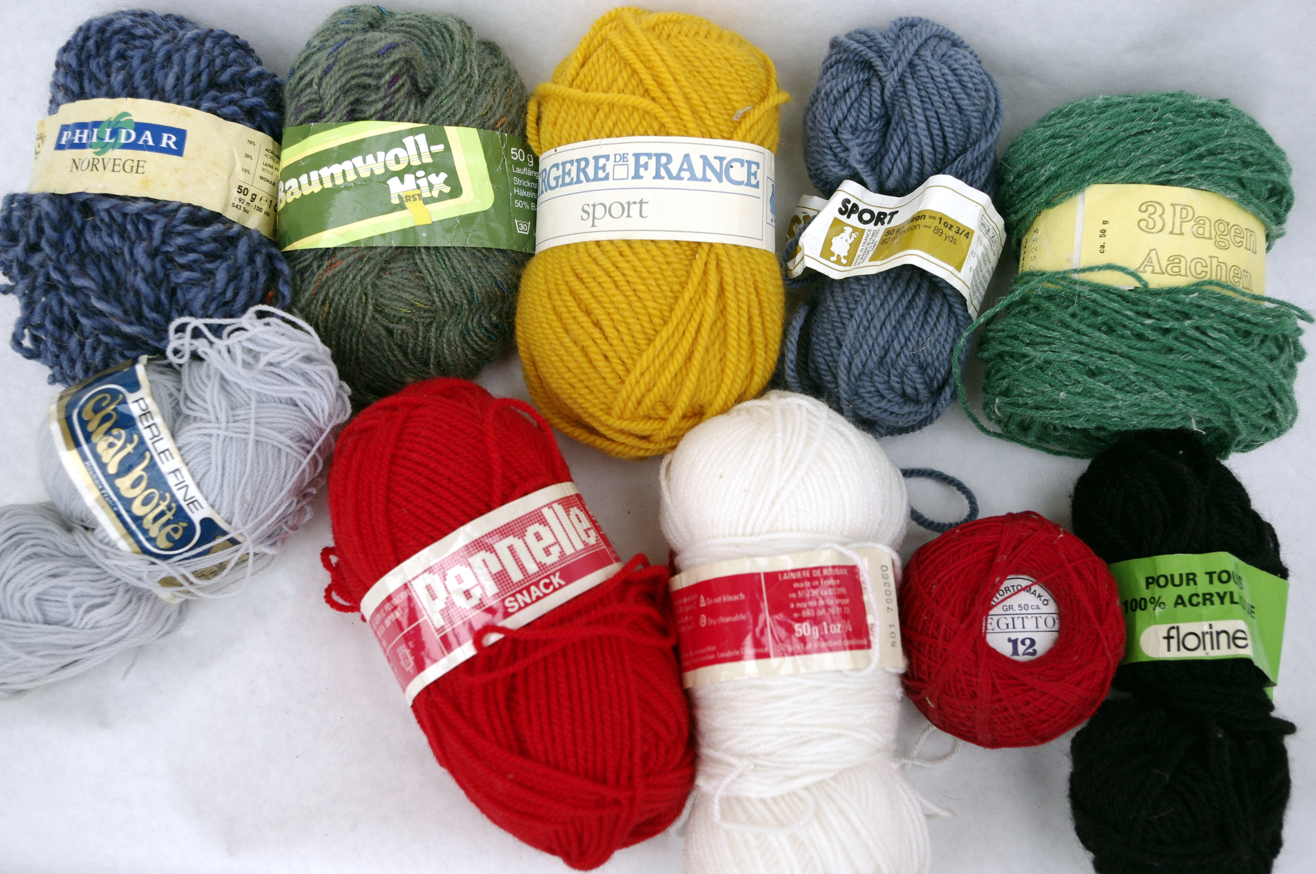 Strickwolle verschiedener Marken und Qualitäten, 1970er Jahre